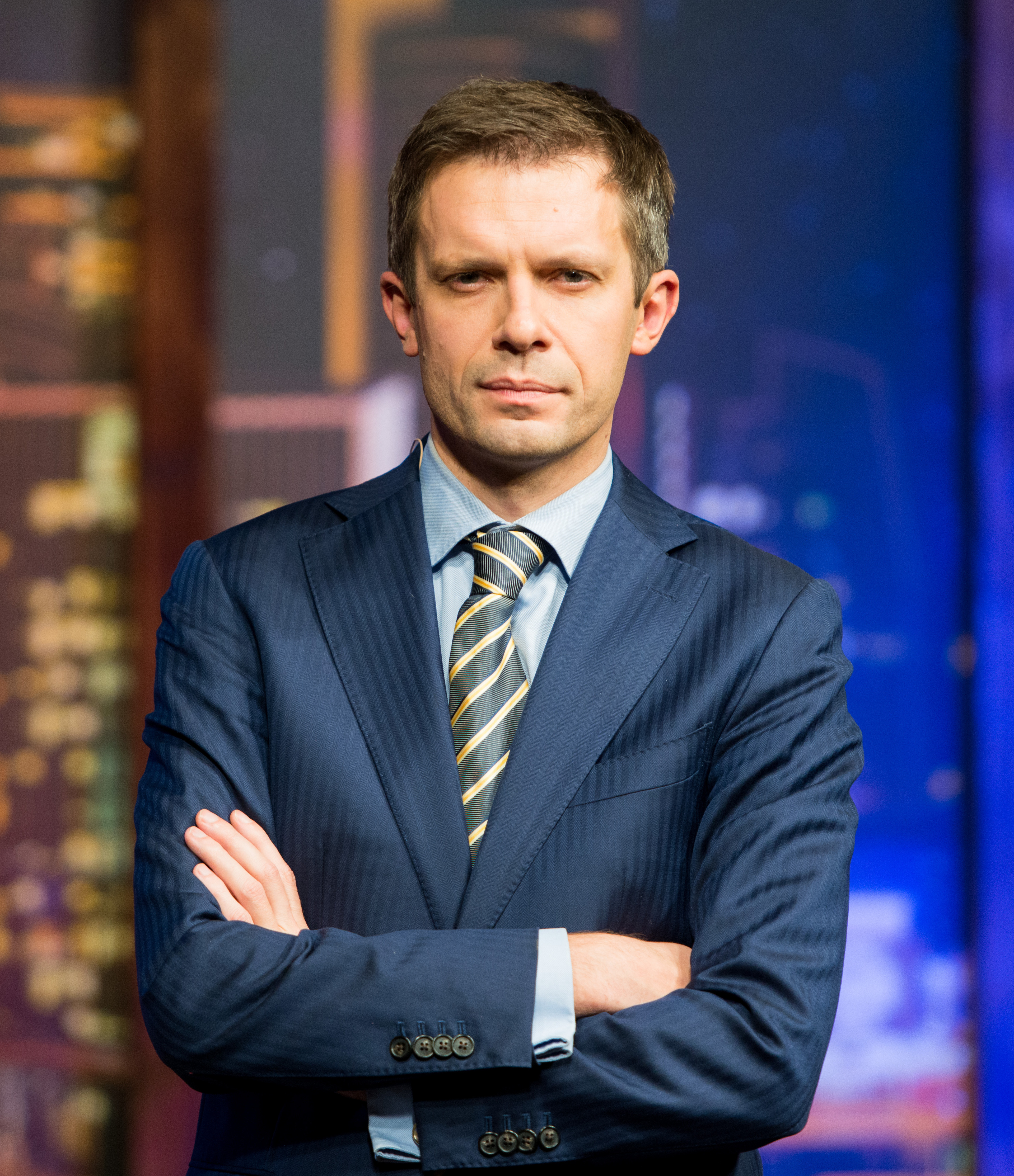 Andrius Tapinas laidoje "Laikykitės ten su Andriumi Tapinu"